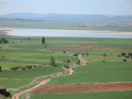 Fotografía Comarca del Jiloca - Laguna de Gallocanta